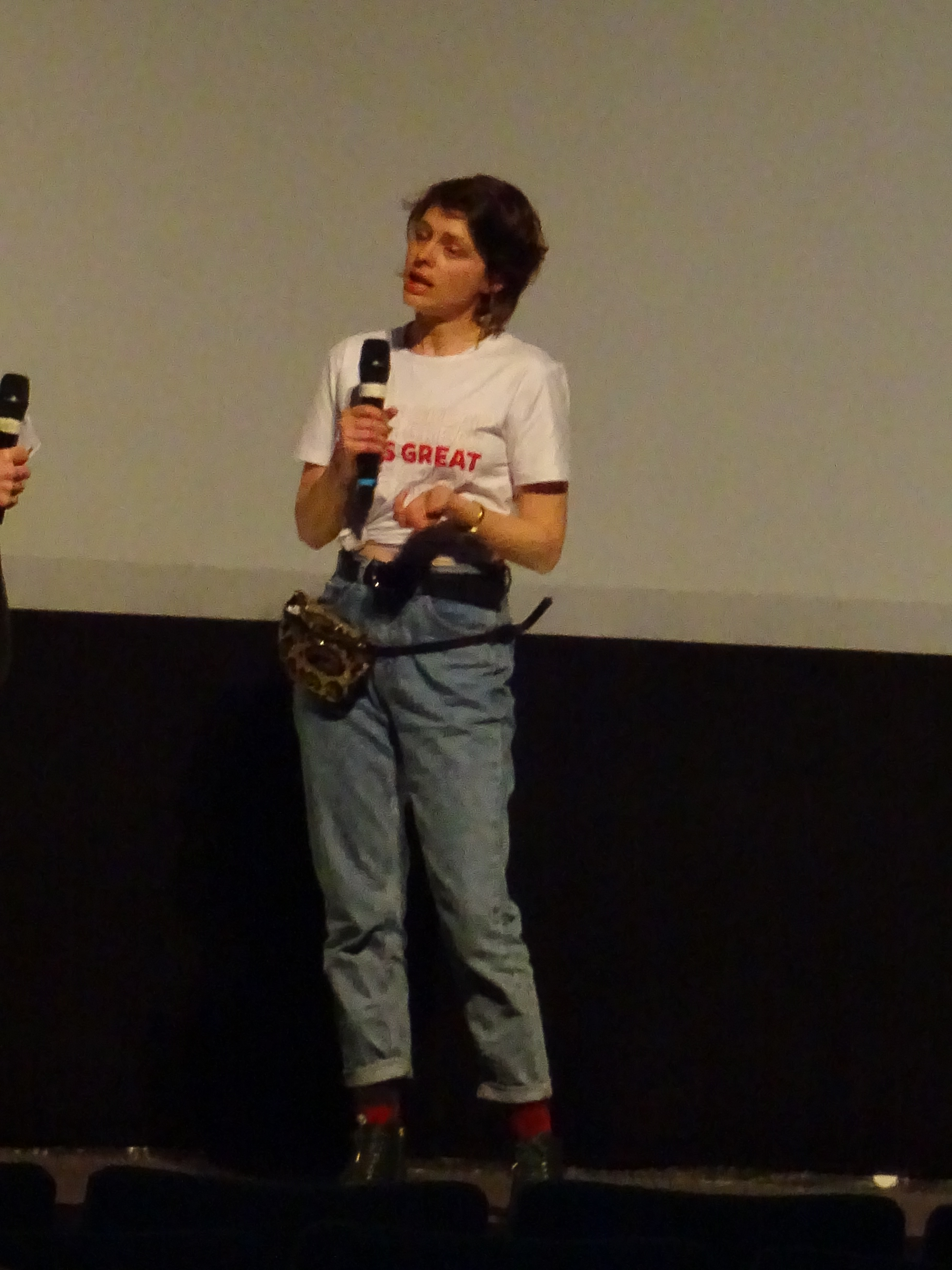 Die israelische Regisseurin Mili Pecherer bei einem Publikumsgespräch auf der Berlinale 2020